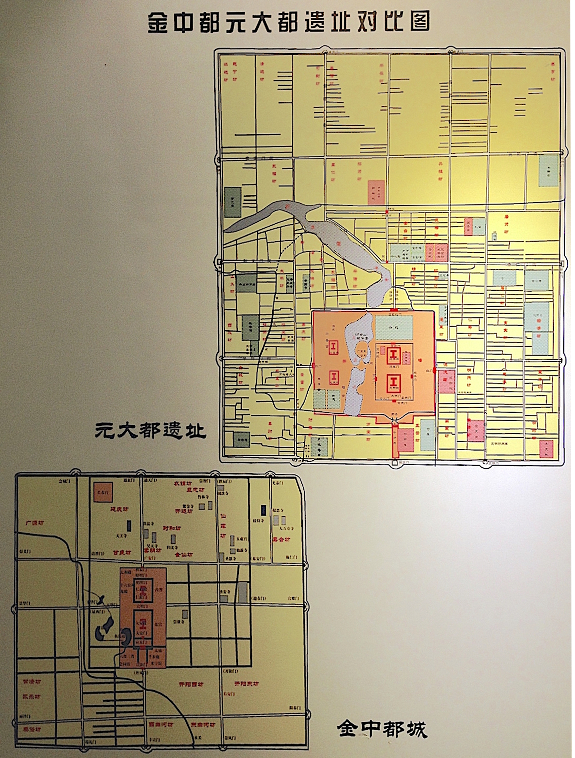 Karta över Zhongdu och Dadu